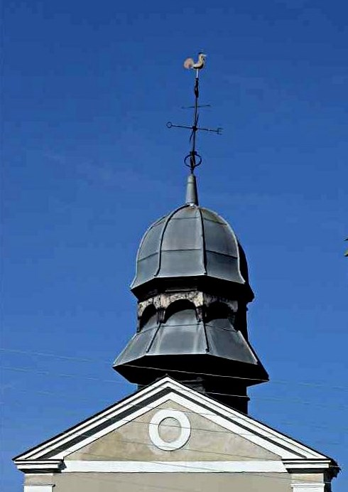 Église Saint-Baudile de Brou-sur-Chantereine avant le ravalement de 2014. Seine-et-Marne, France. Le clocher et le fronton.